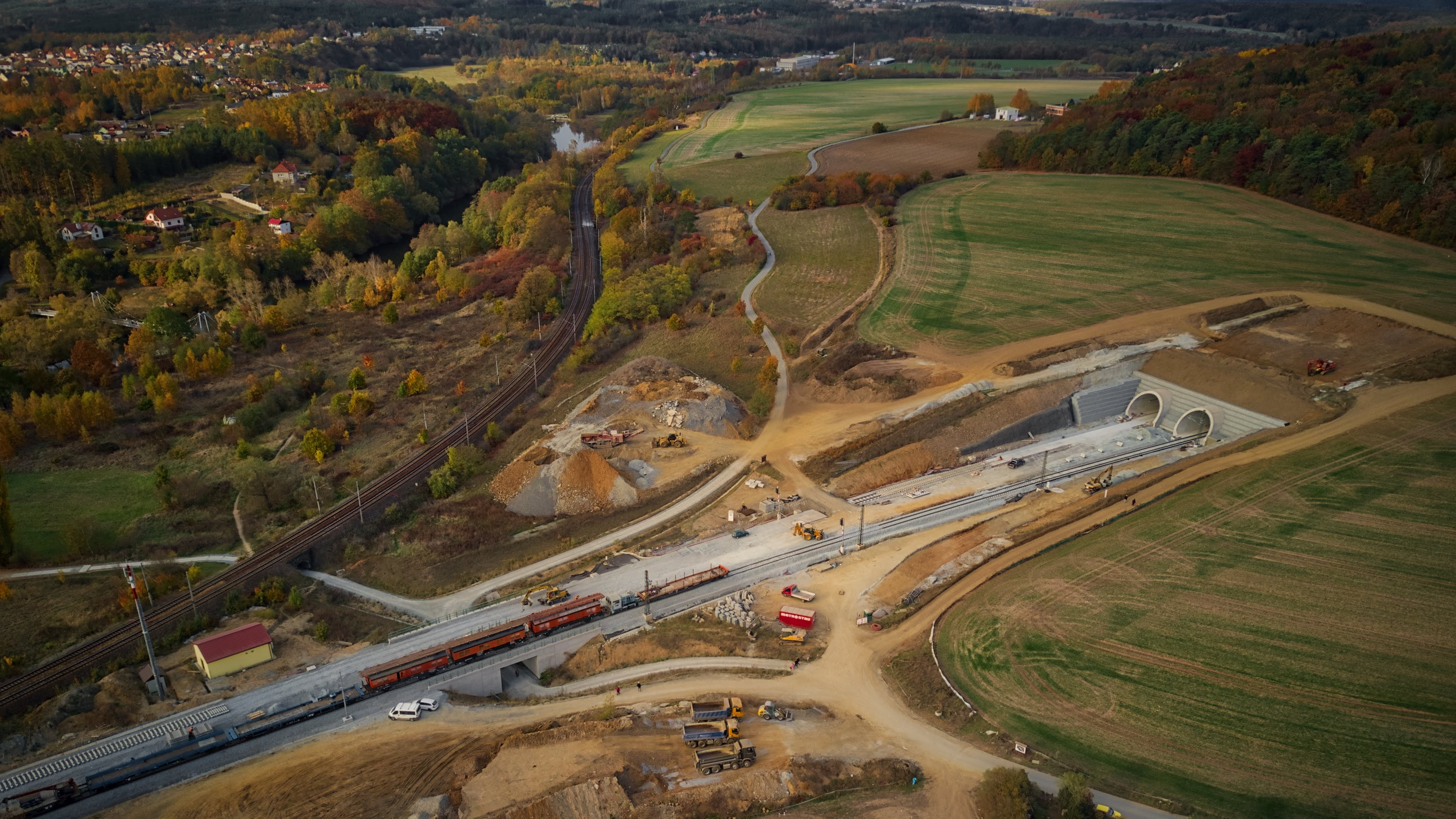 Letecký pohled na západní portál cca měsíc před plánovaným průjezdem prvního vlaku.